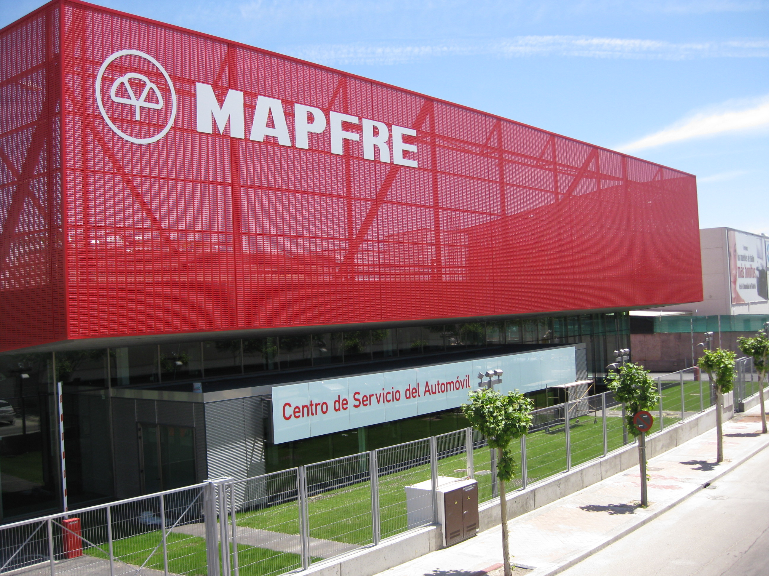 Mapfre Centro se Servicio de Alcorcón